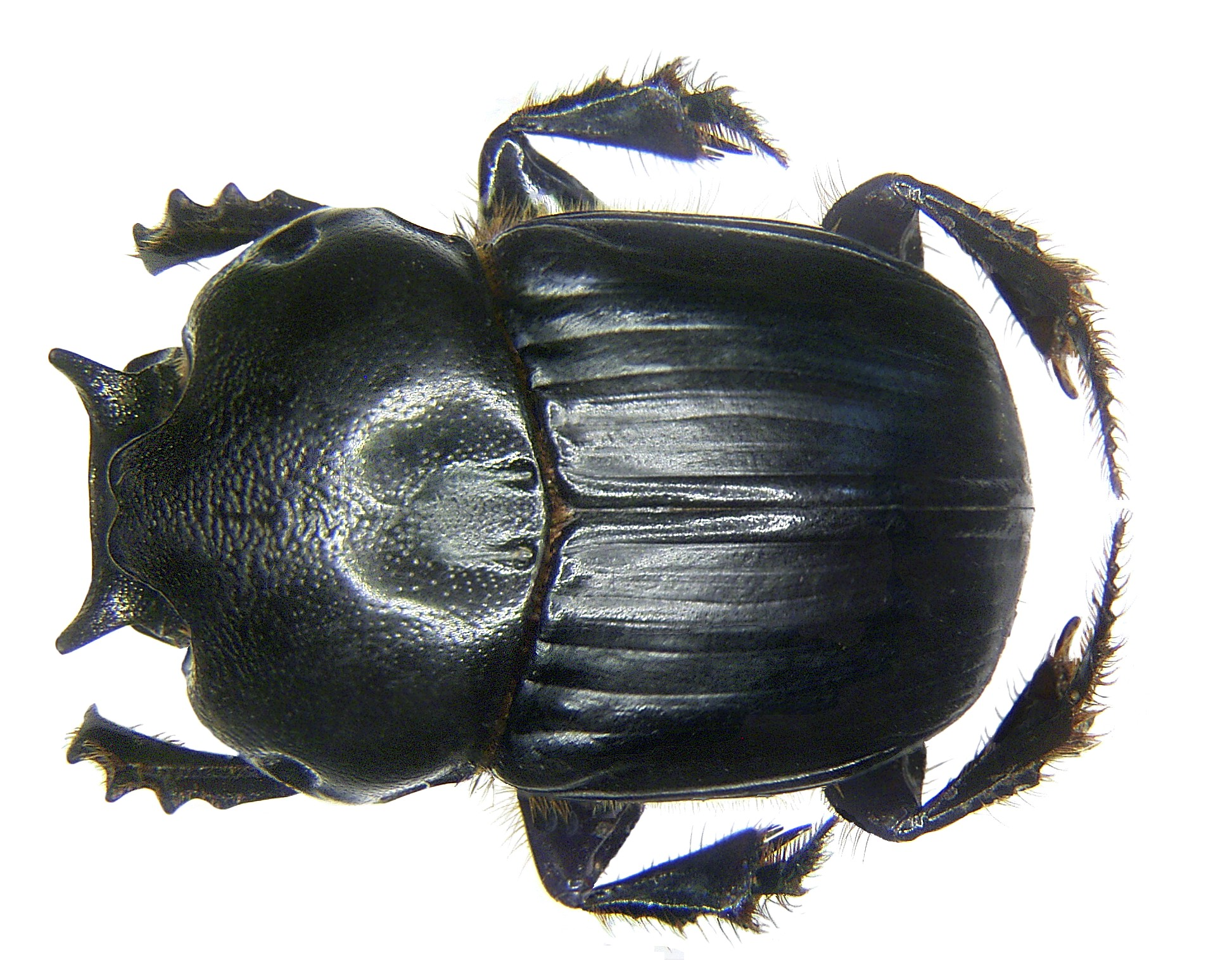 Familie: Scarabaeidae Grösse: 12-20 mm Verbreitung: Nordafrika, Türkei Fundort: Tunesien, Djerba, Mezghaya leg.det. U.Schmidt, 2007 Foto: U.Schmidt, 2007